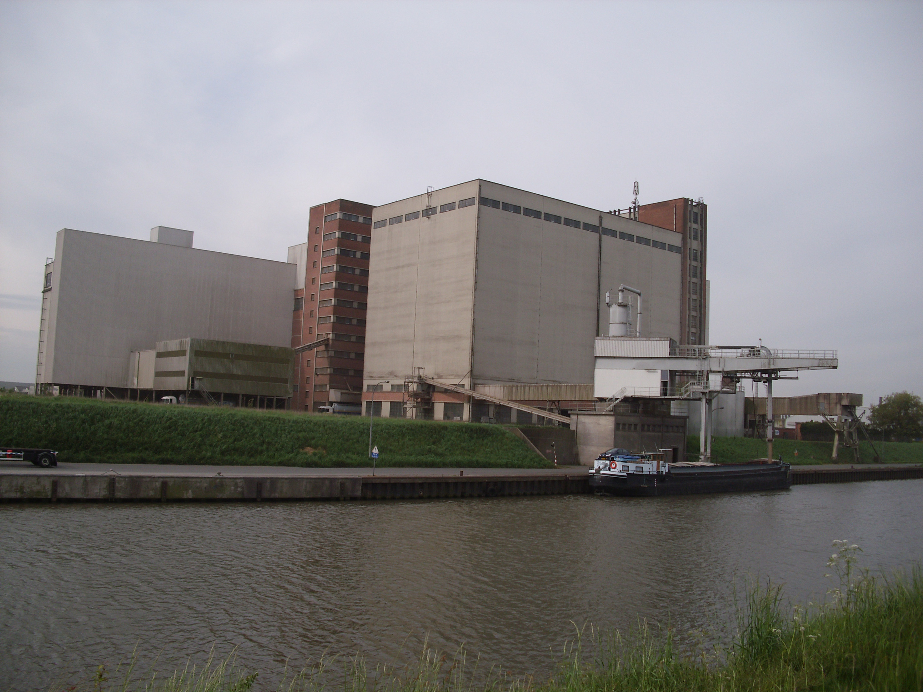 Aveve (onderdeel van de Boerenbond) - veevoederbedrijf - langs Kanaal Gent-Brugge - Aalter - Oost-Vlaanderen - Vlaanderen - België